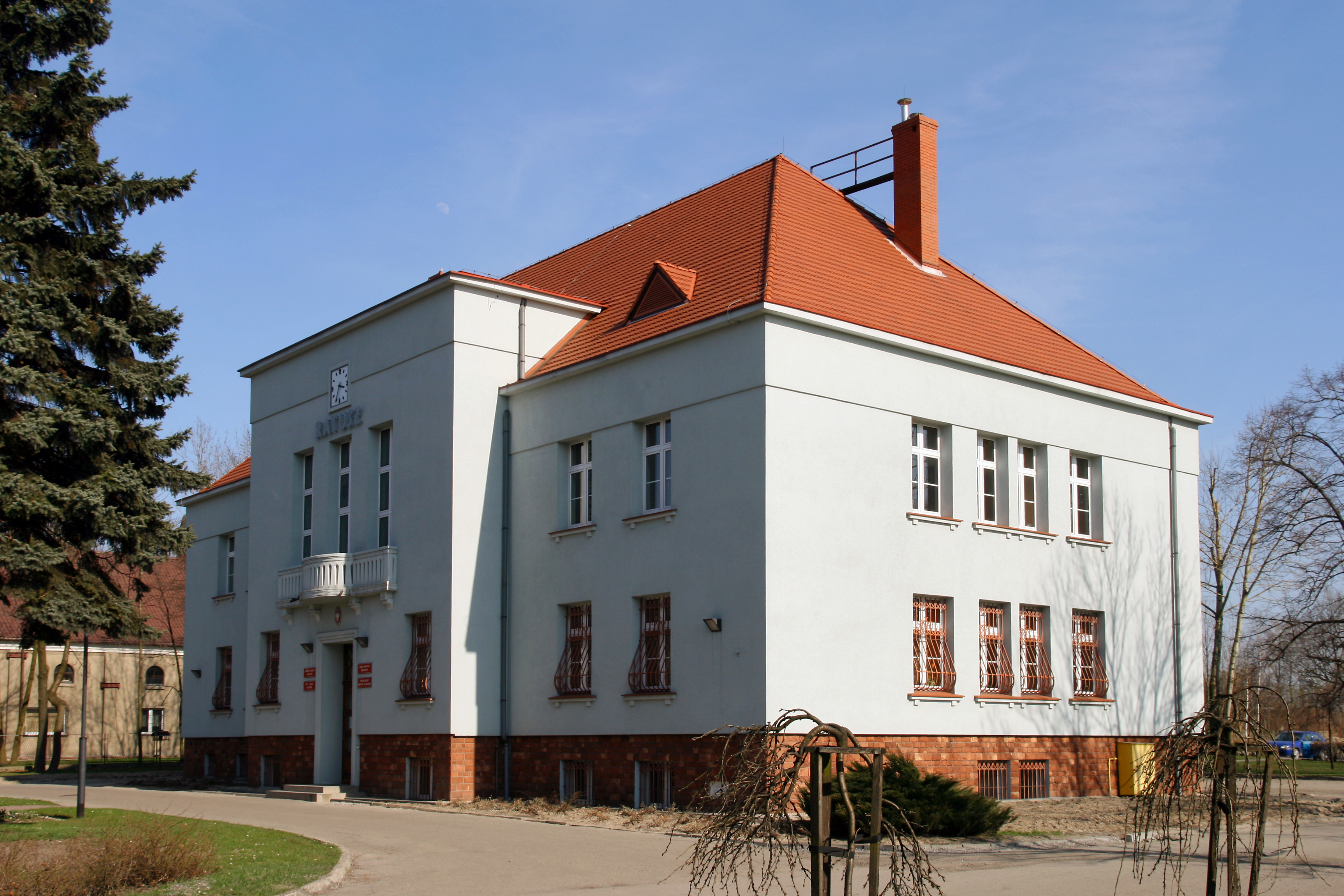 Ratusz w Knurowie.